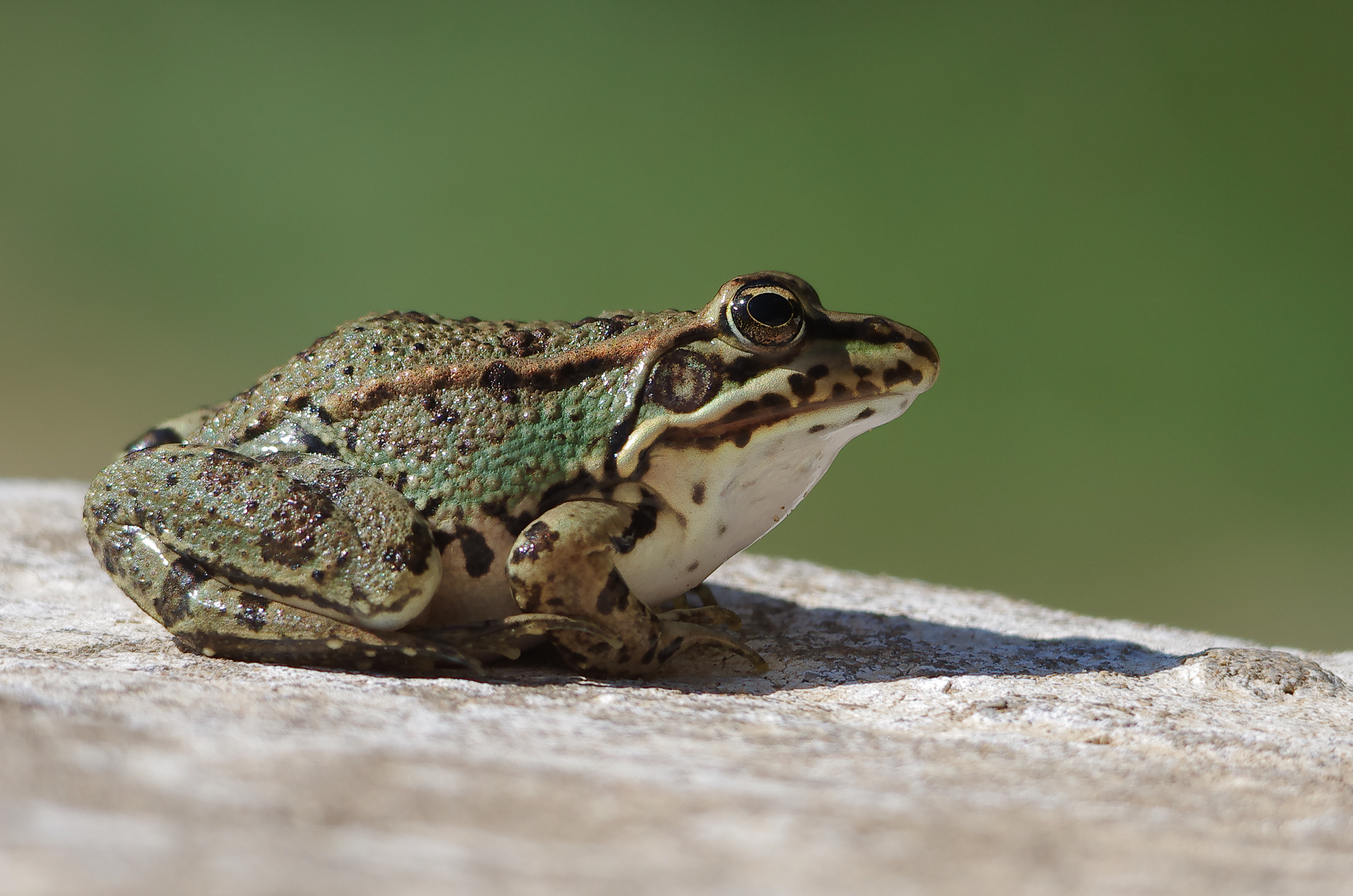 Grenouille du Sahara -Pelophylax saharicus- Rana saharica. (Djebel El Haouaria Z.I.C.O).